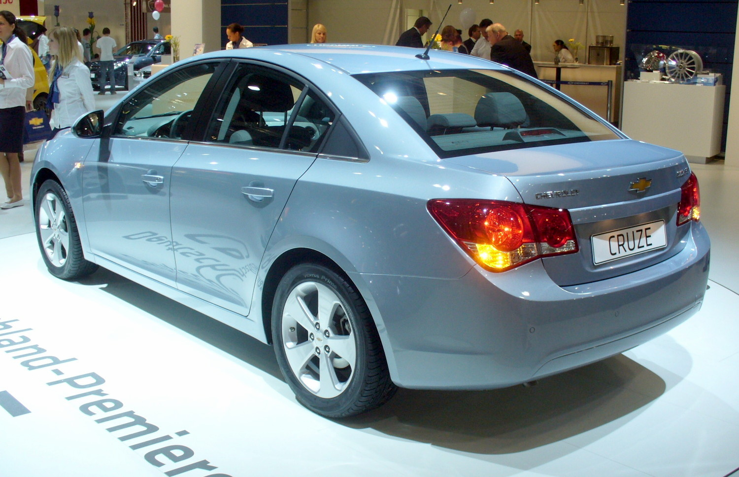 Chevrolet Cruze